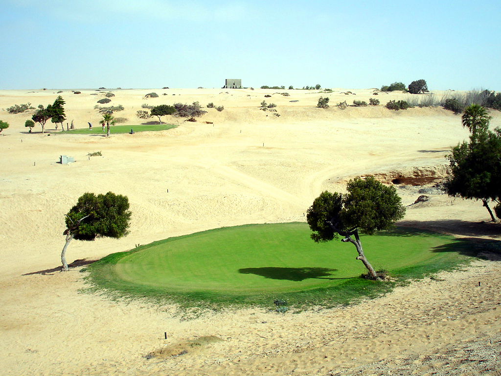 Golfplatz in Hentiesbucht, Namibia